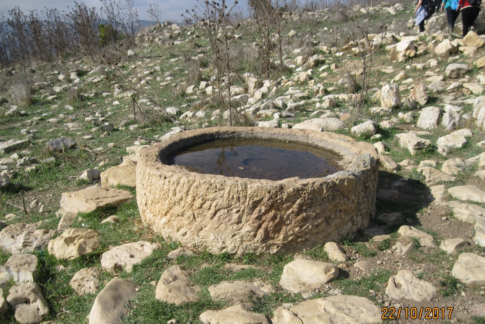 Bak Ruins